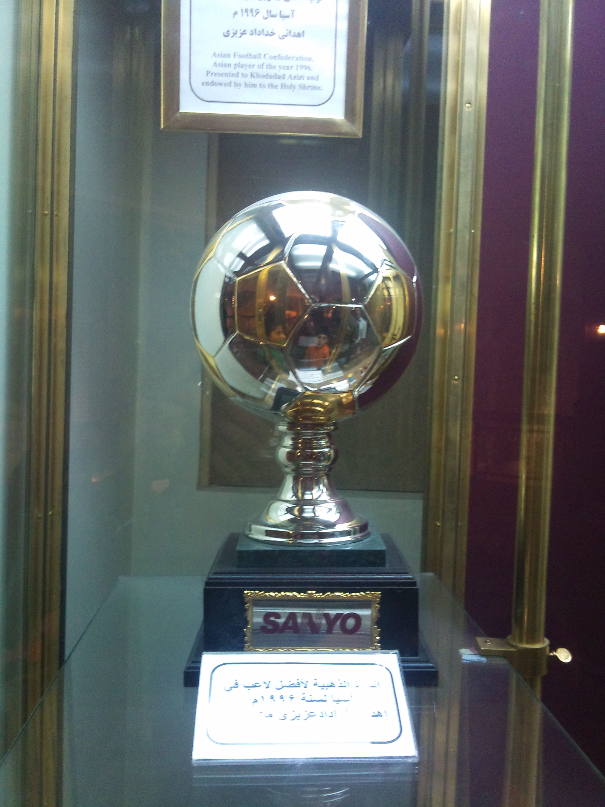 Mashhad museum